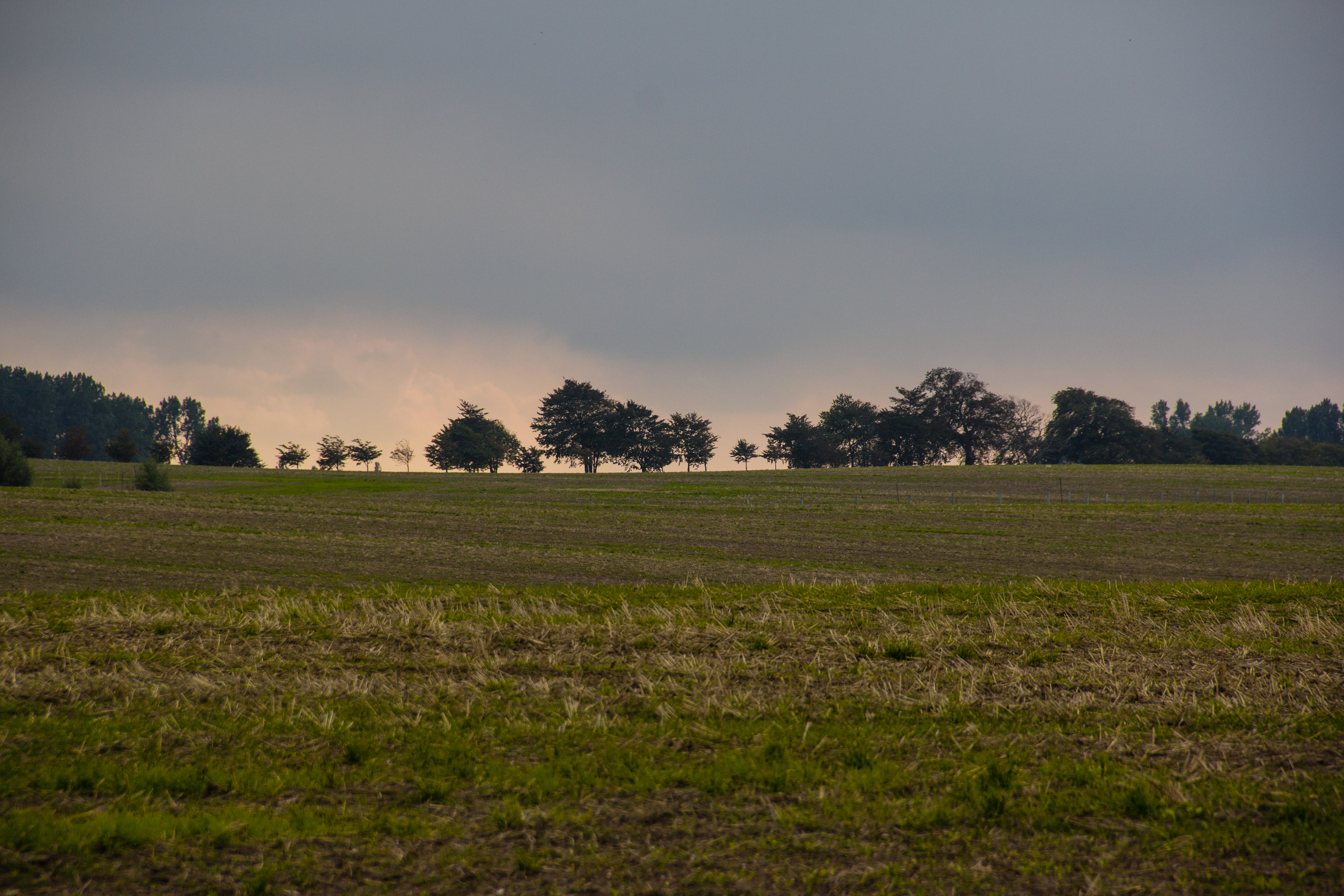 Die Kühlung, FFH-Gebiet, Kühlungsborn, Rerik